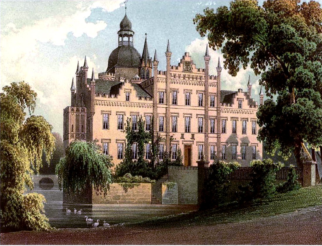 Schloss Möckern, Lithografie aus dem 19. Jahrhundert